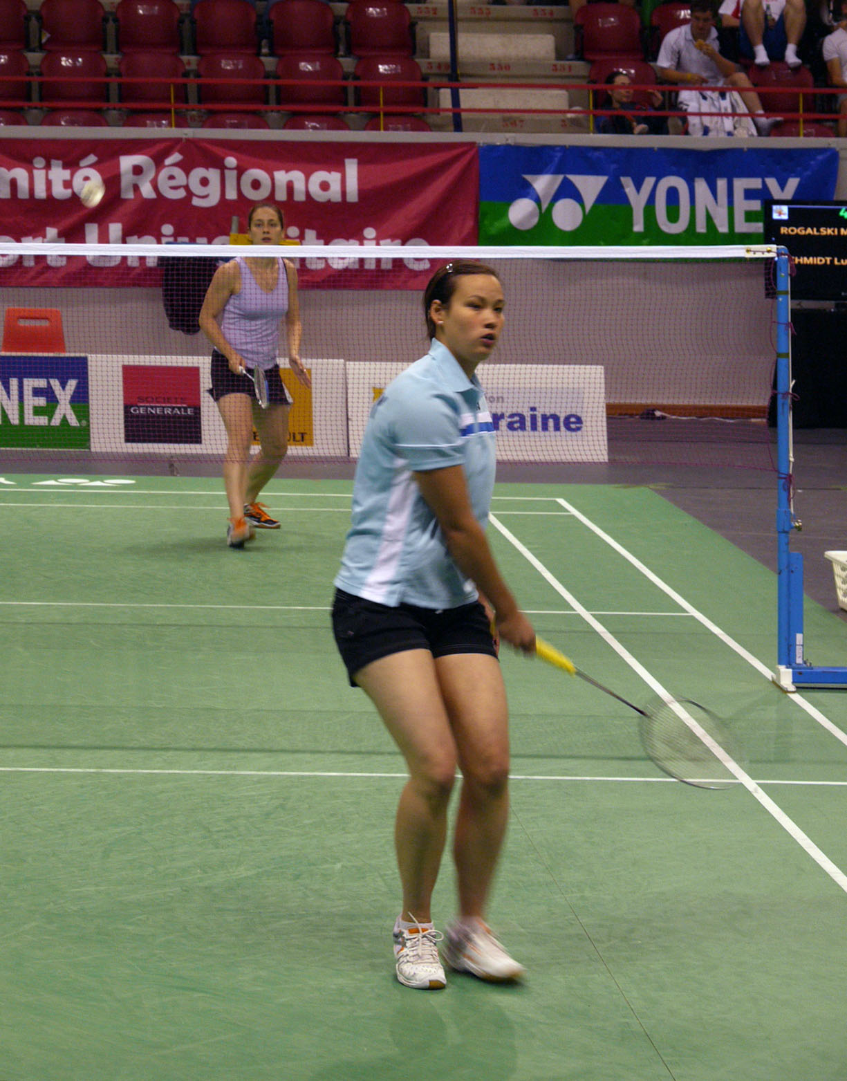 Elena Prus and Kim Buss